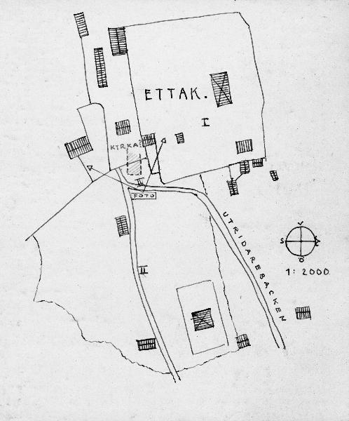 Kartskiss över kyrkplatsen och dess omgivning. Kategori: (01) ExteriörerKartskiss över kyrkplatsen och dess omgivning.